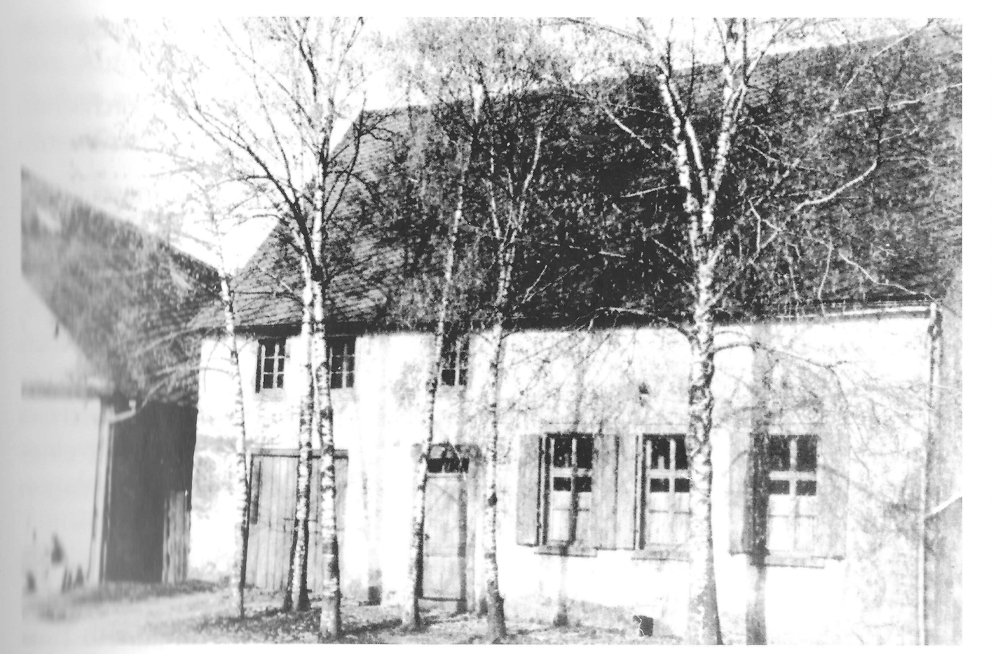 Ehemaliger Beetsaal der Kirchengemeinde Kleinich